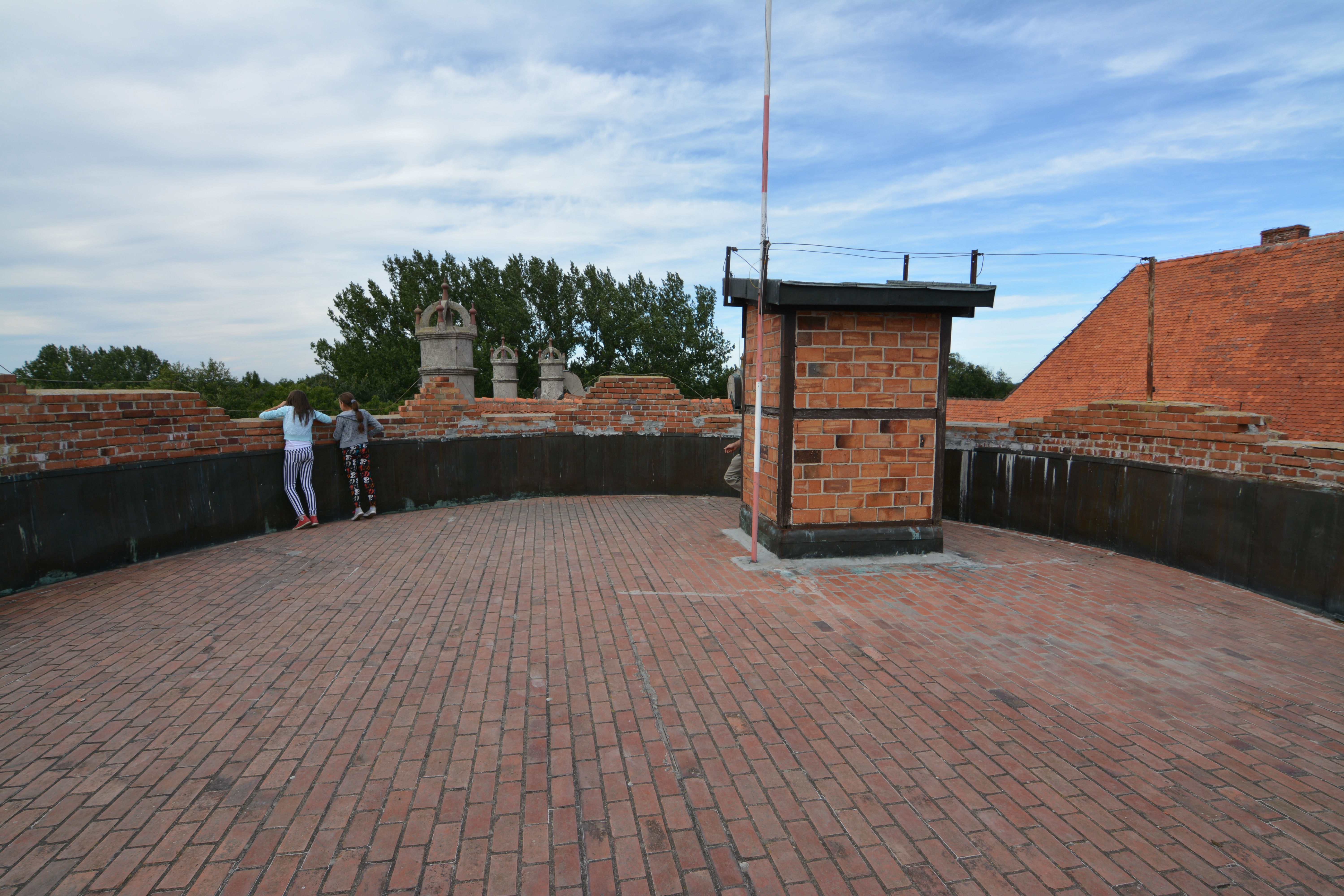 Pęzino - zamek, XIV, 1 poł. XVI, 1600, XIX